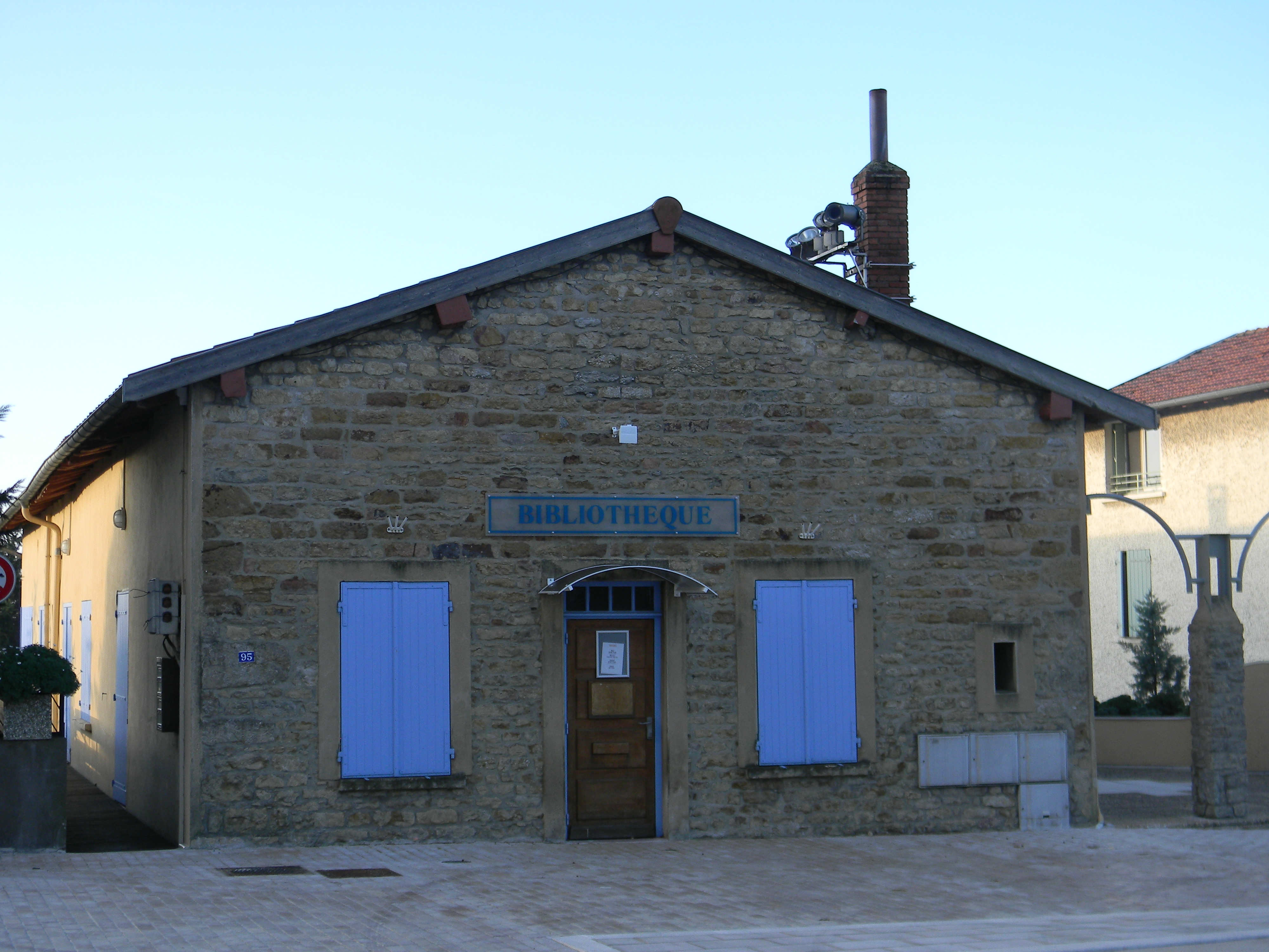 La bibliothèque de Limonest.